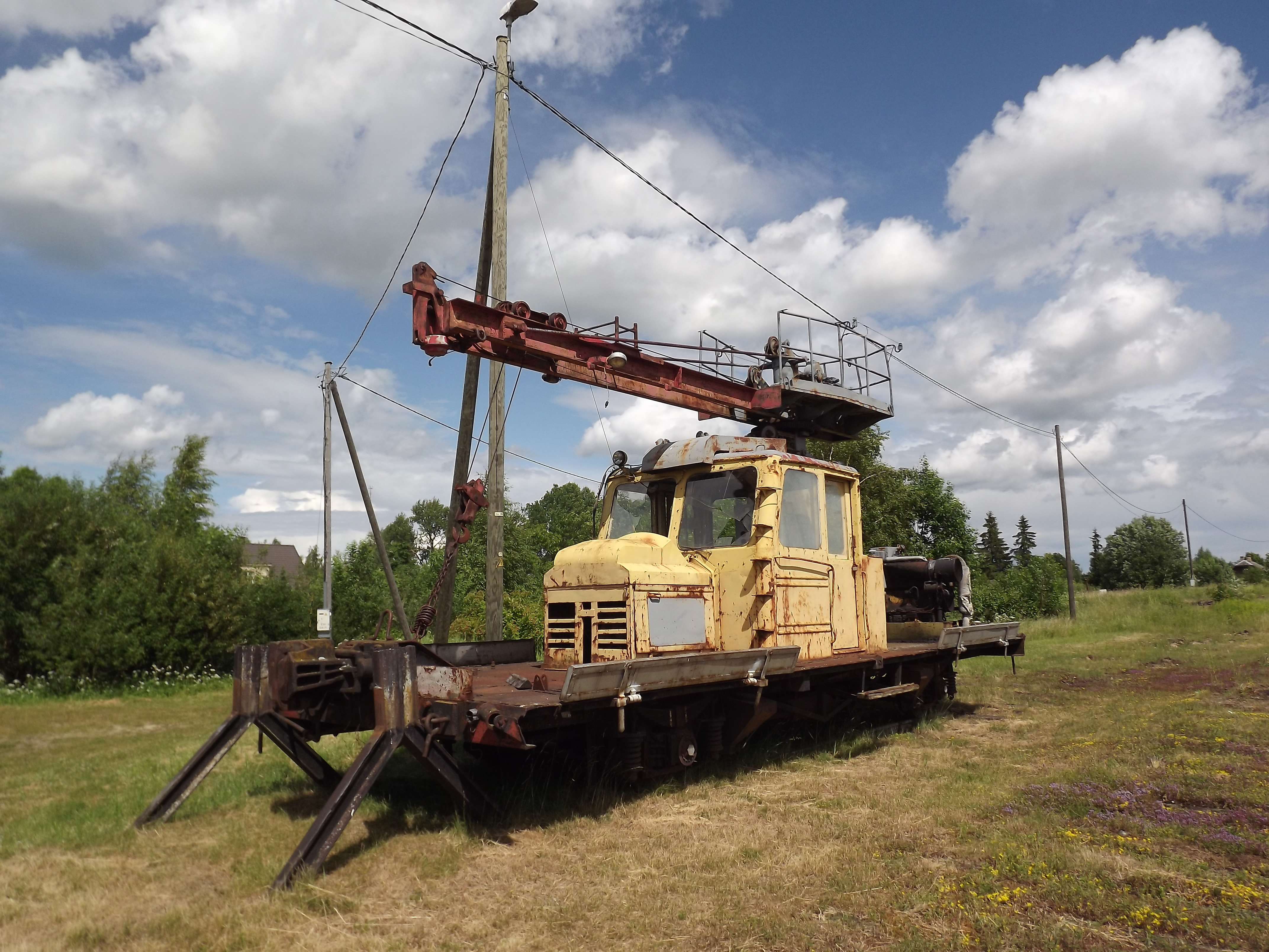 Mahajäetud dresiin